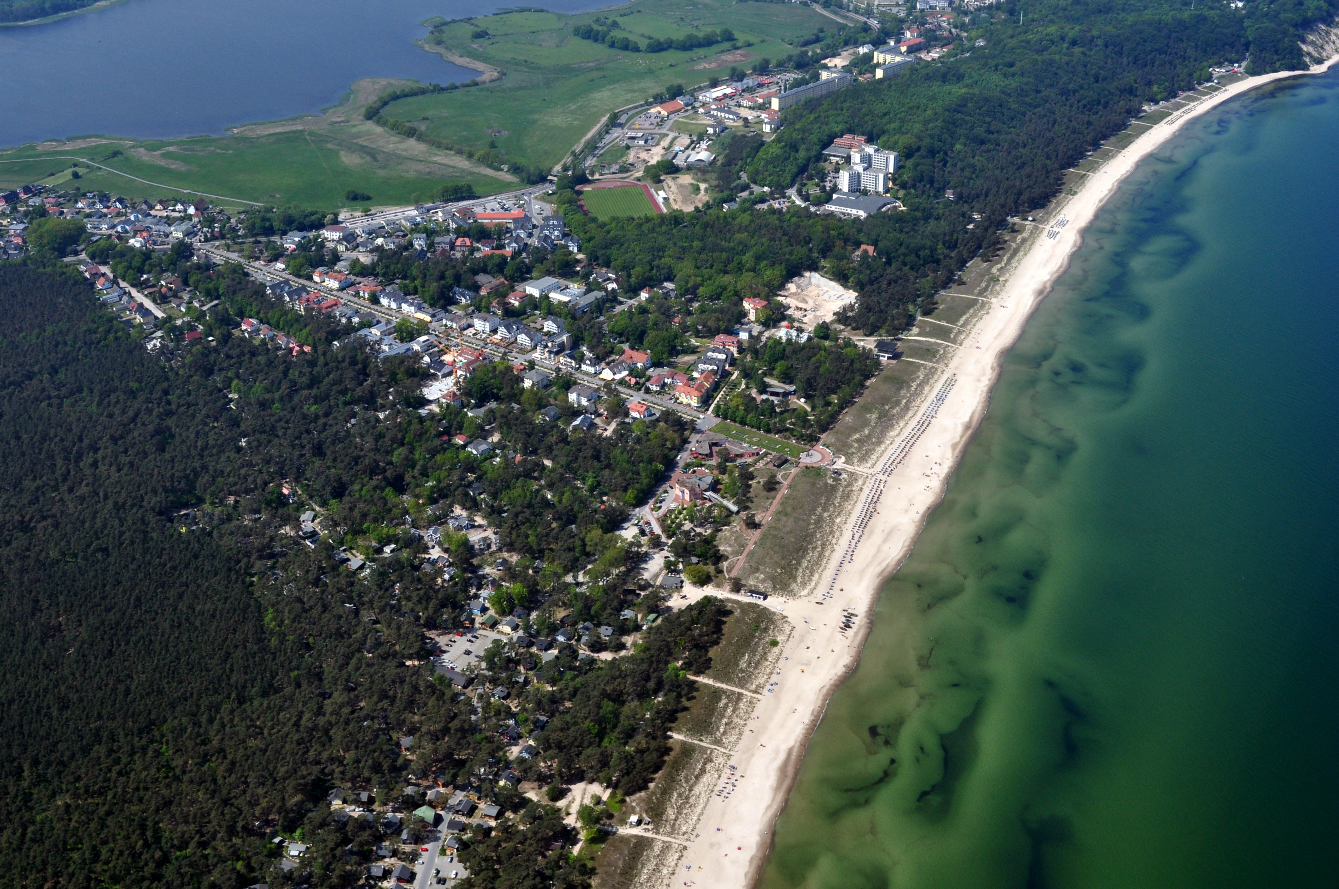 Die Bilder wurden von mir während eines einstündigen Rundflugs ab Flugplatz Güttin am 21. Mai 2011 aufgenommen. Die Bildbeschreibung steht im Dateinamen. Aufgenommen mit einer Nikon D5000 durch das Seitenfenster des Flugzeugs.